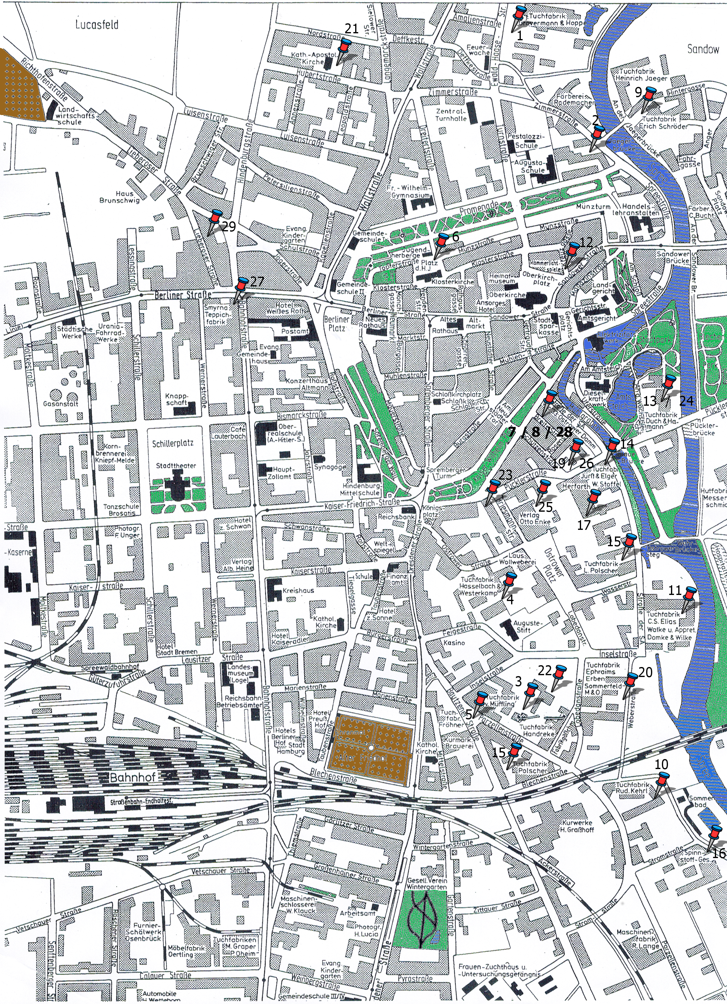 Stadtkarte 1938.1